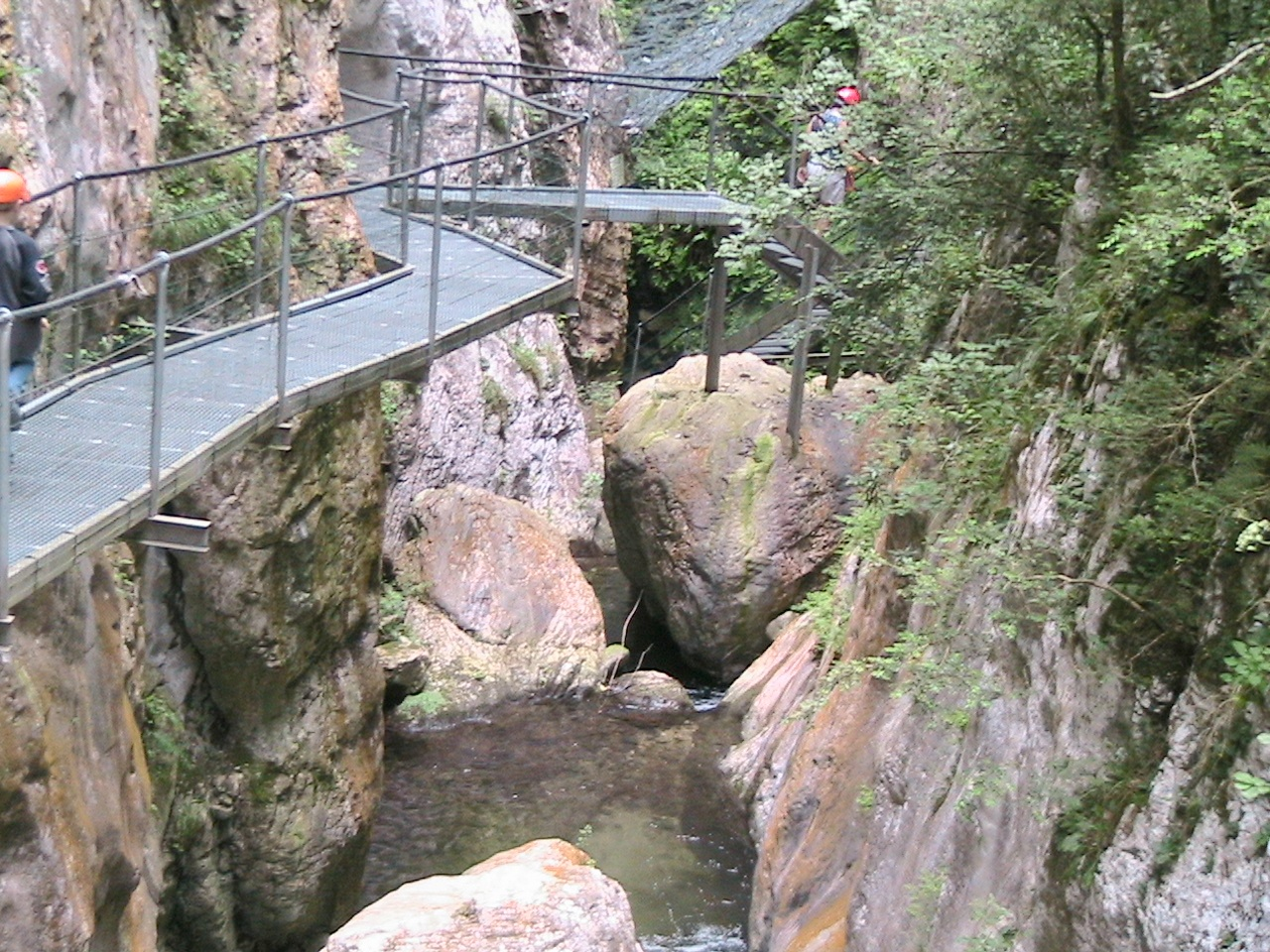 Gorges de la Fou (Arles-sur-Tech, Pyrénées-Orientales, France).